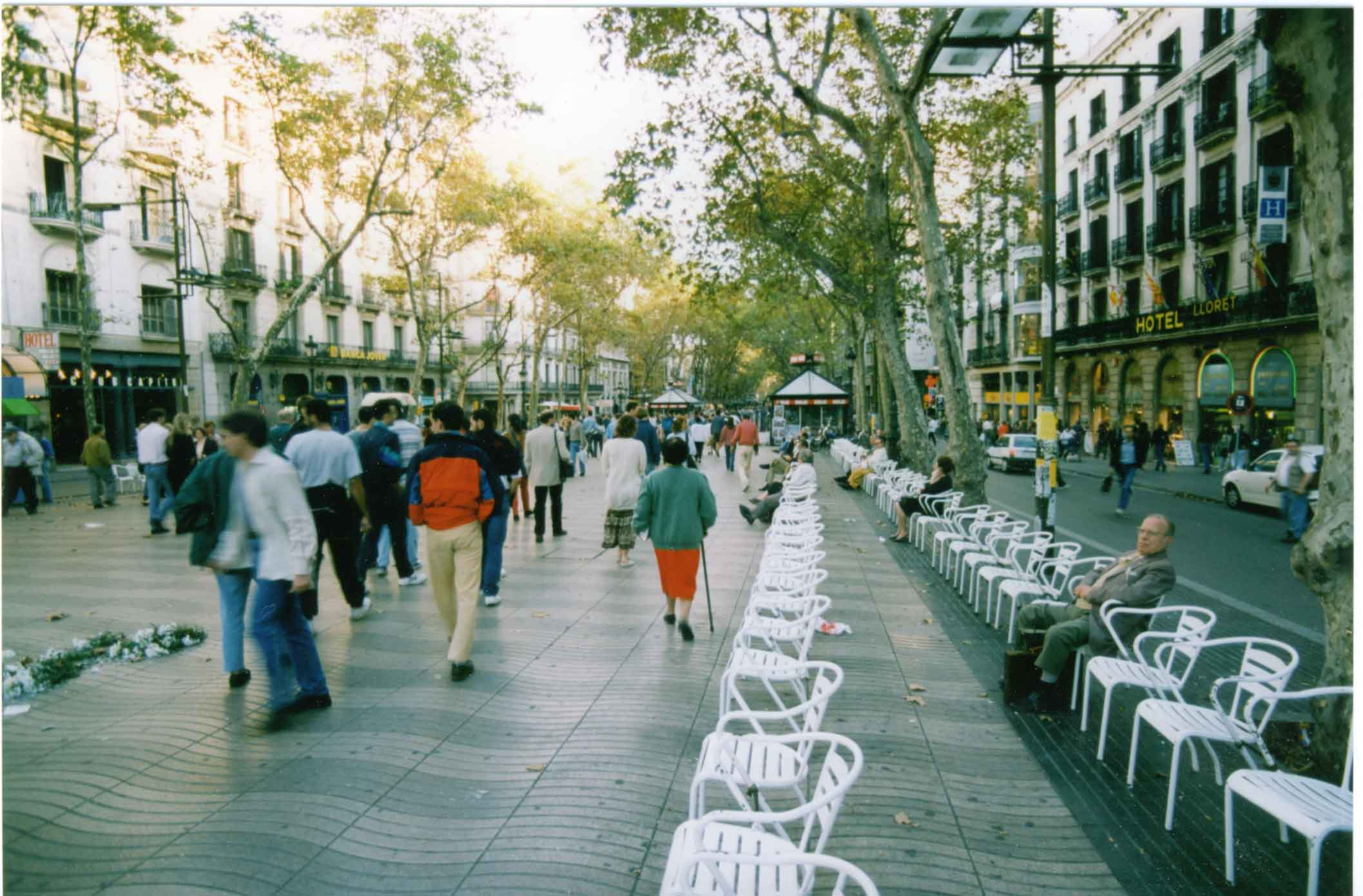 Die Ramblas am nördlichen Ende